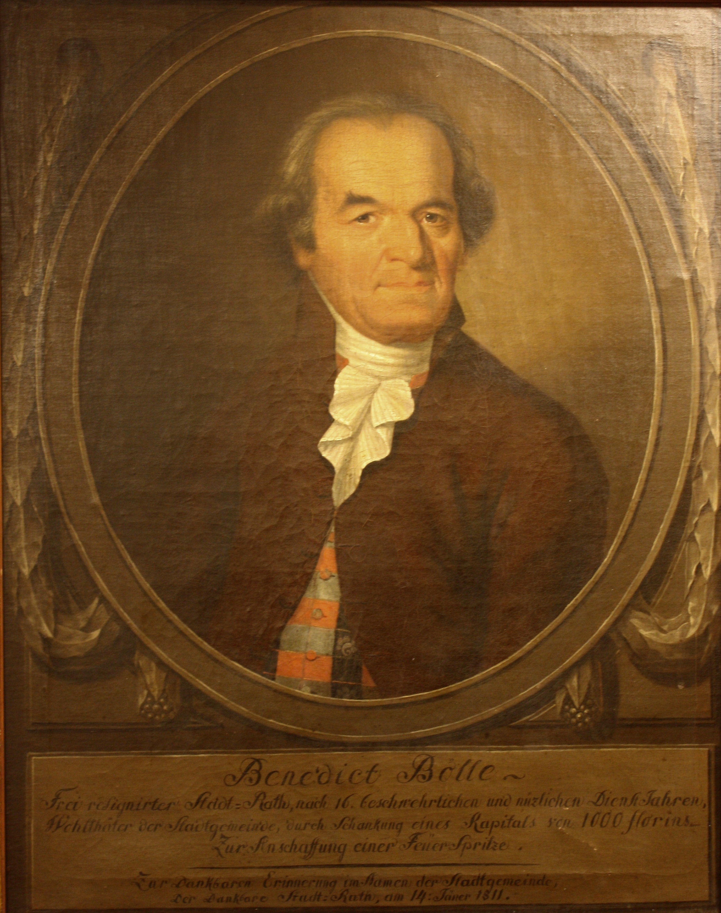 Porträt des ausgeschiedenen Ratsherrn und Rebstockwirts Benedikt Bölle, in Auftrag gegeben auf einen Ratsbeschluß vom 14. Januar 1811 in der Stadt Waldshut.